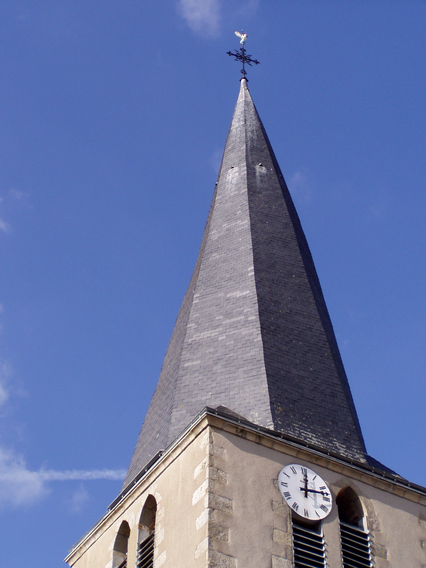 st_pierre_echauborgnes1.jpg